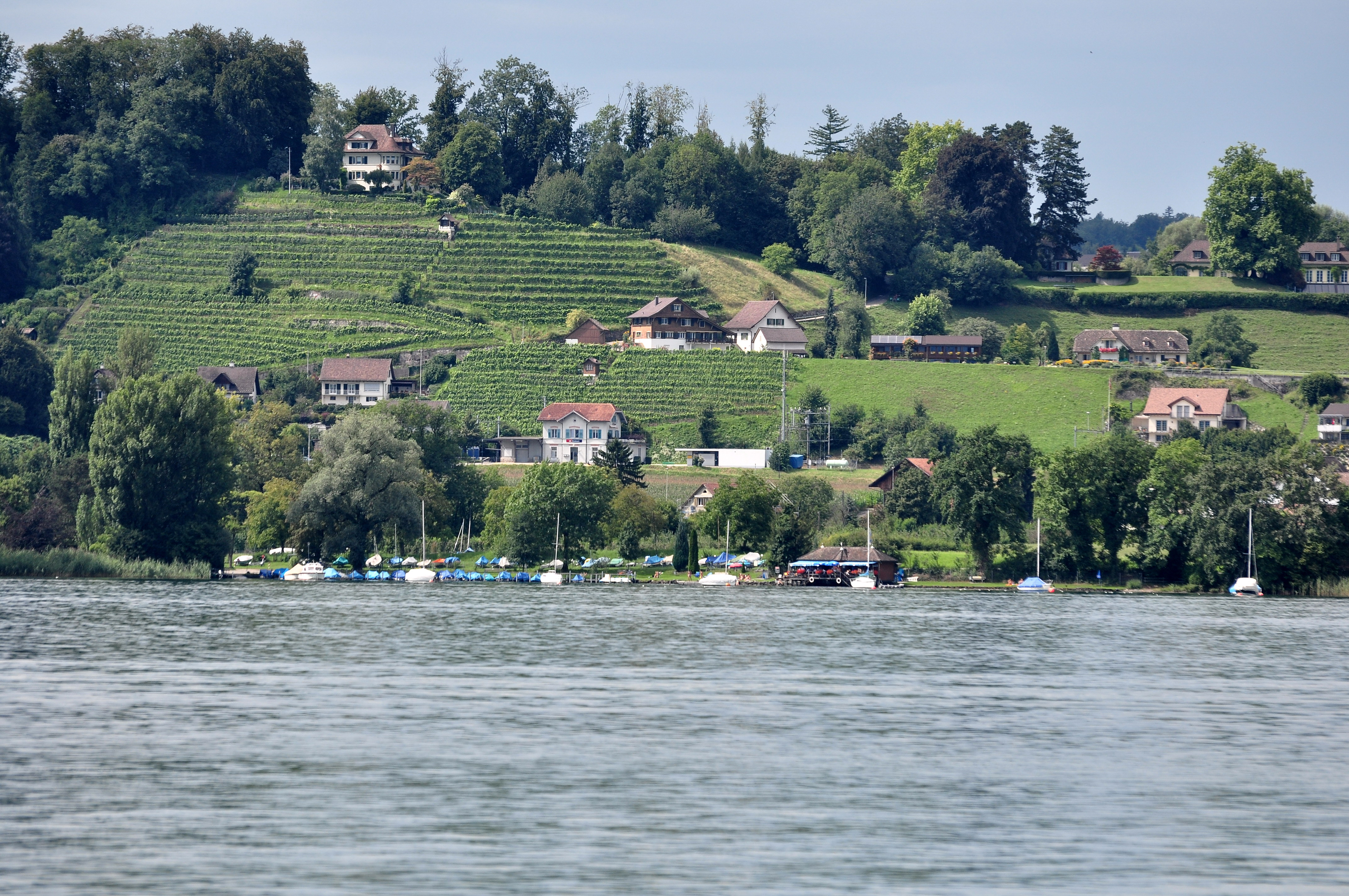 Feldbach as seen from Zürichsee-Schifffahrtsgesellschaft (ZSG) motorship Helvetia nearby Ufenau island